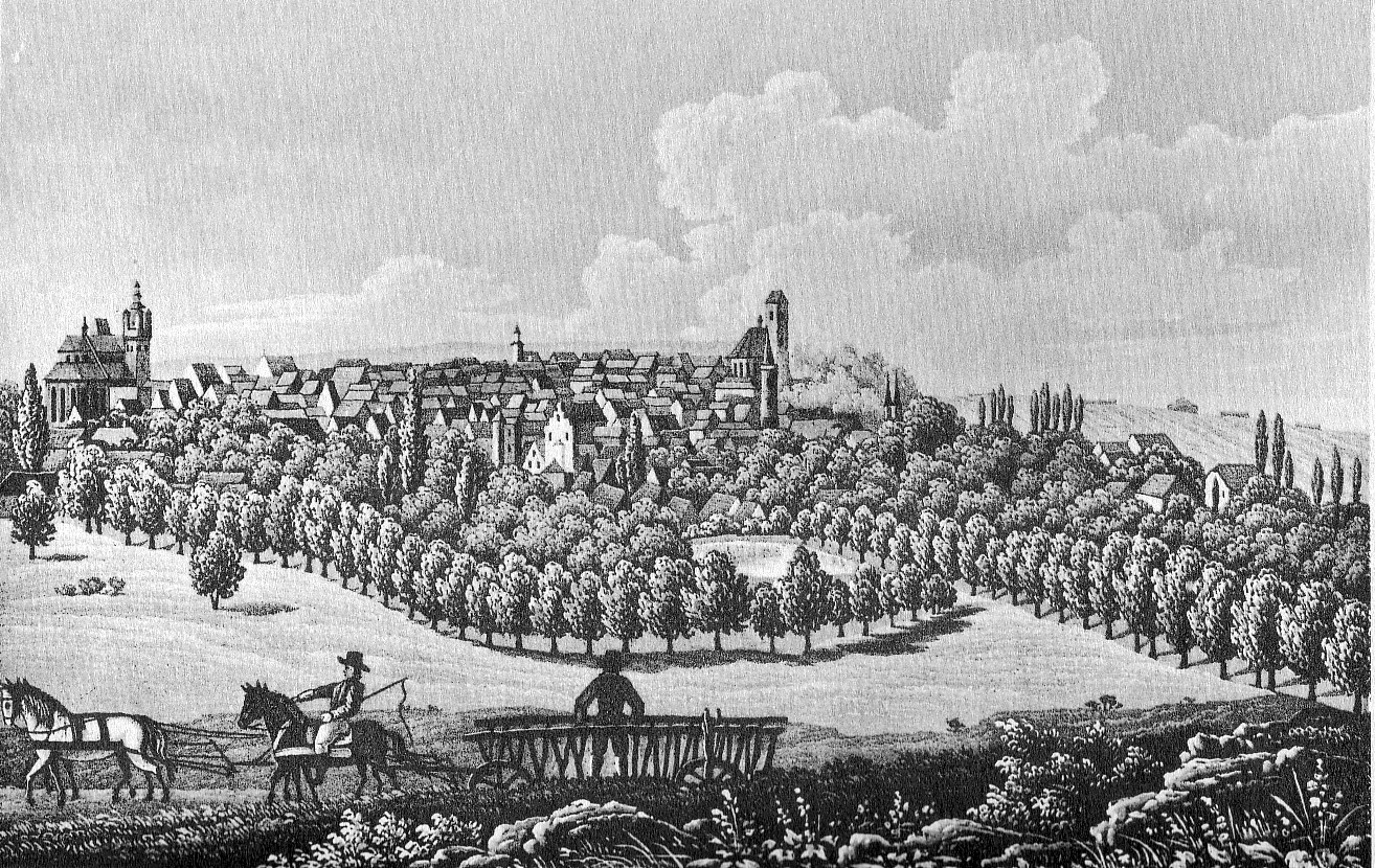 Historische Ansicht von Stargard in Pommern (heute Stargard Szczecinski in Polen). Stahlstich.